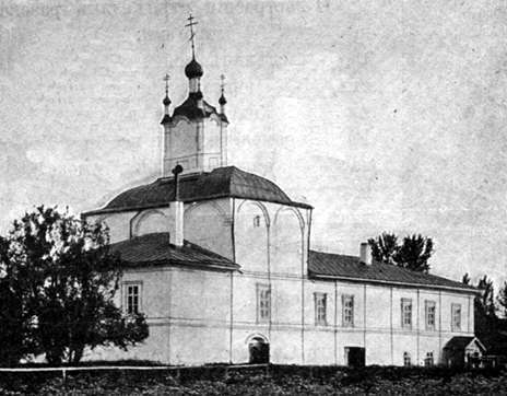 St_George_Church_(warm)_Vologda